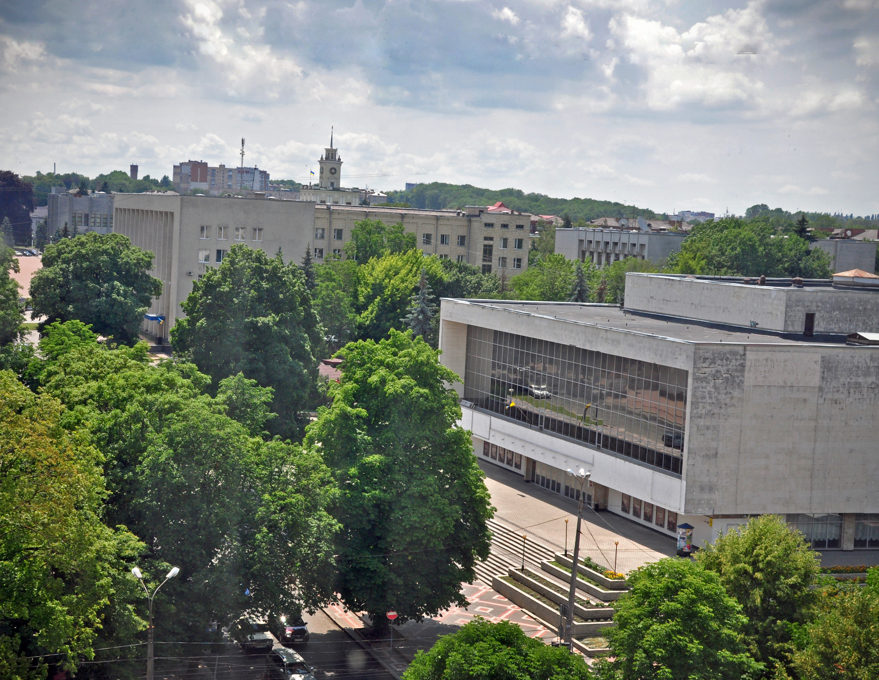 театр, бувший Петровського , Хмельницький, вул. Соборна, 60